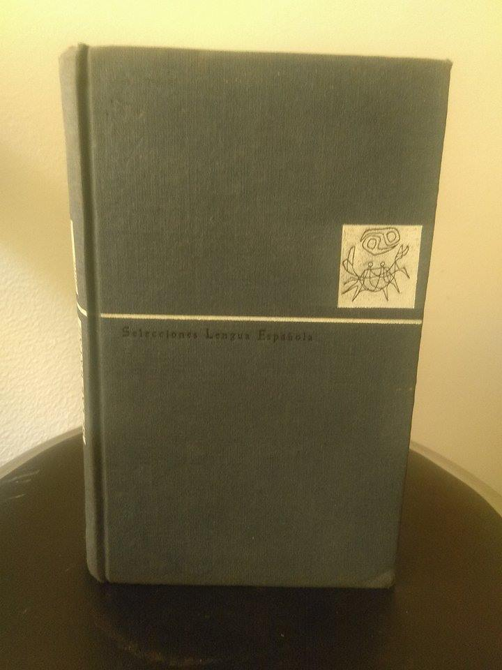 Primer edición (Plaza & Janés) de La Rebelión de las Ratas